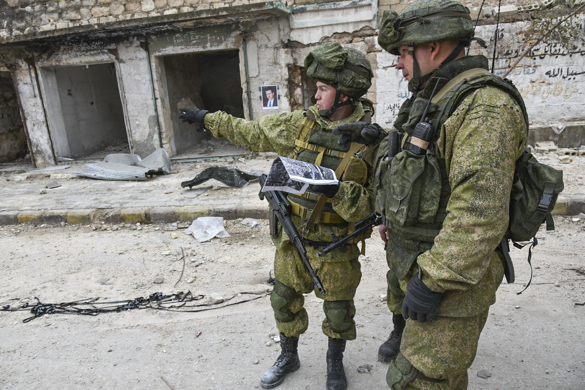 Работа сапёров Международного противоминного центра Министерства обороны России в Алеппо (Сирия)